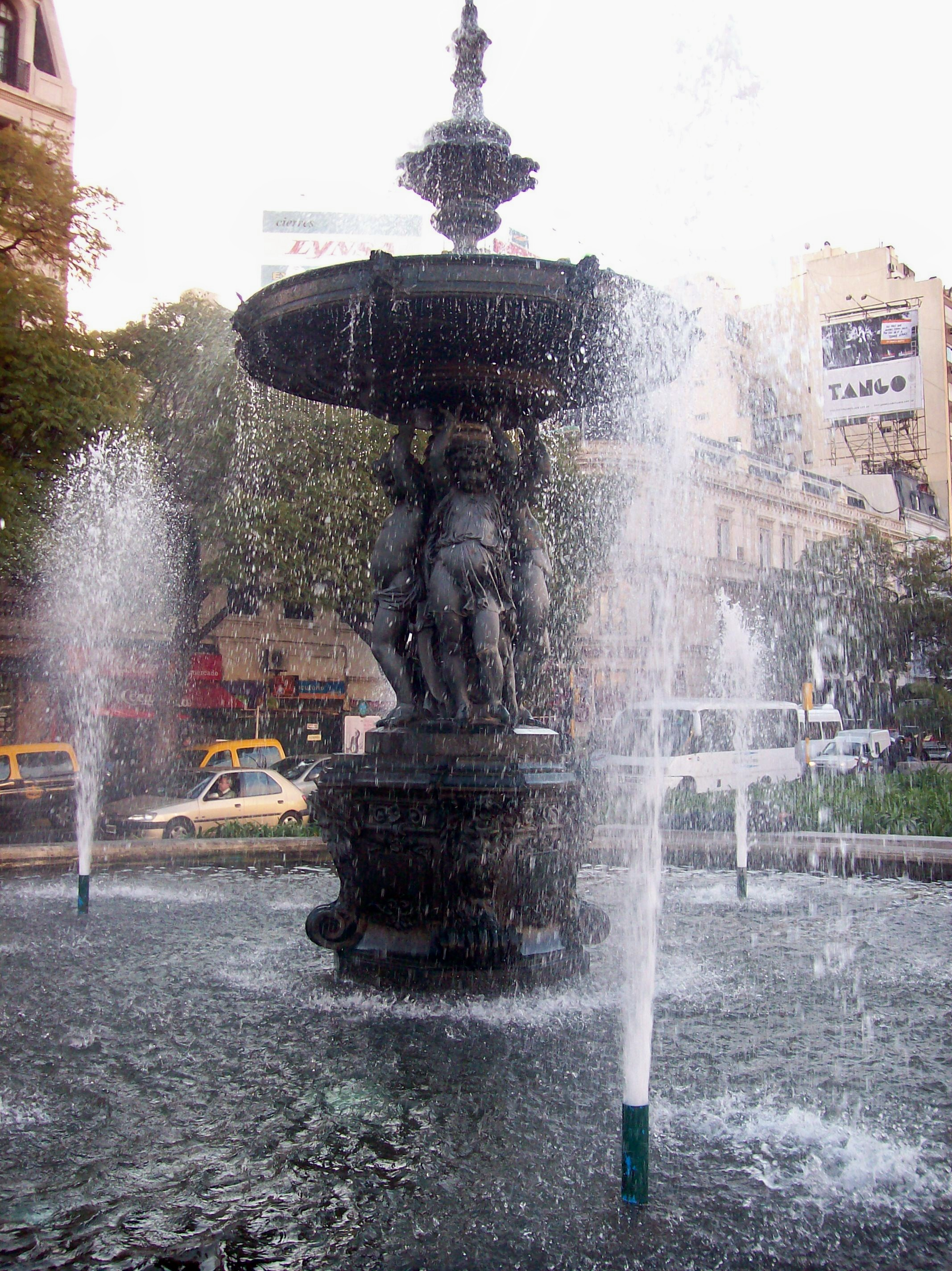 Fuente ubicada en la intersección de Avenida de Mayo y 9 de Julio, Buenos Aires, Argentina.